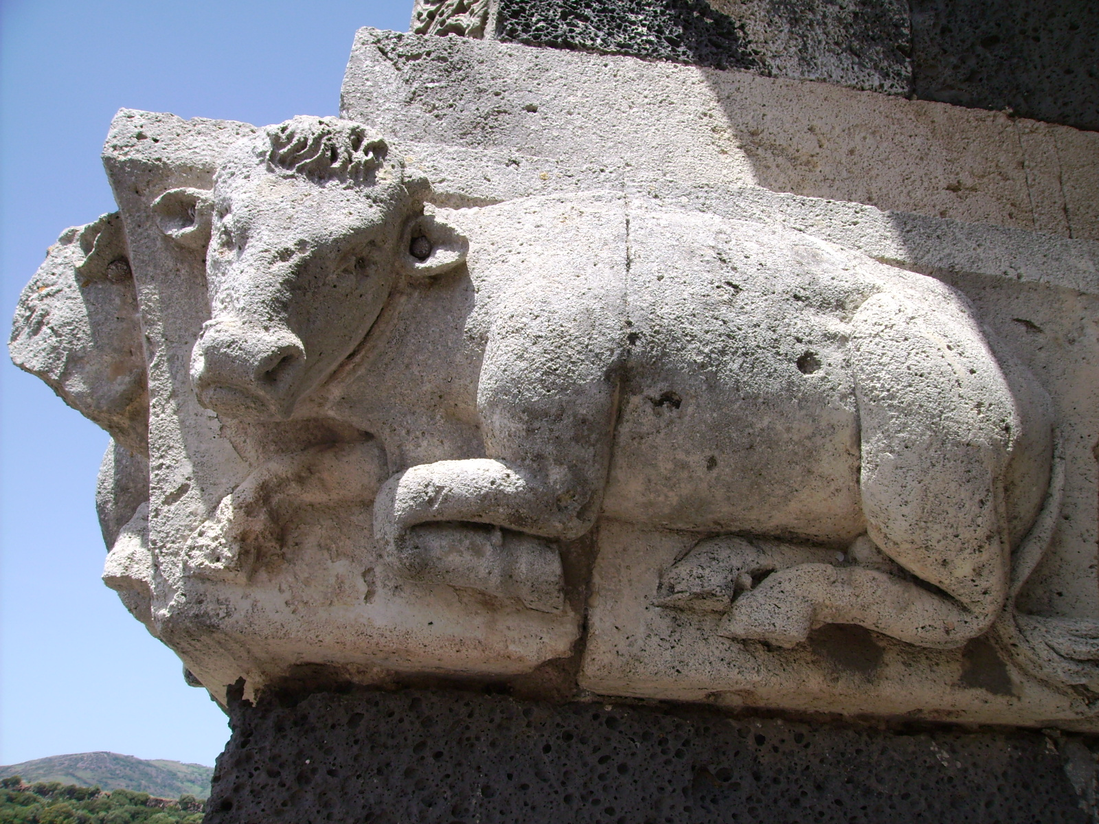 Abtei Santissima Trinita di Saccargia, Logudoro, Sardinien